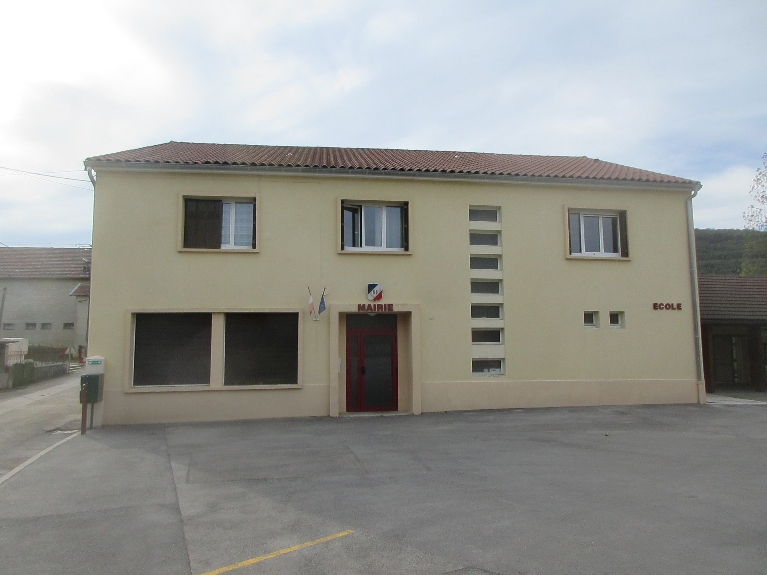 Mairie de Cernon, Jura, septembre 2018.